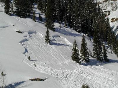 Schneebrettlawine